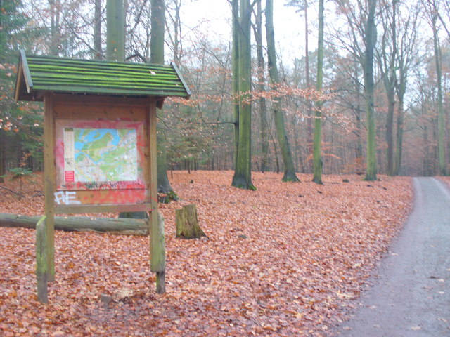 Dueppel Forst - Kurfurstenweg